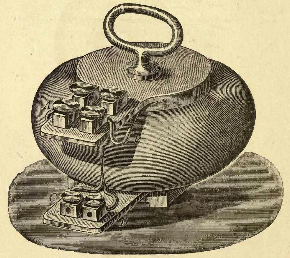 Erster Transformator von 1885, Zeichnerische Darstellung Transformatoren dieses Typ wurde 1885 von der Firma Ganz aus Budapest für die Stallbeleuchtung auf der Landesausstellung in Budapest gebaut. Insgesammt wurden 6 Stück gebaut und je 10 Glühlampen pro Transformator angeschlossen. Die Leistung beträgt ca. 300W.